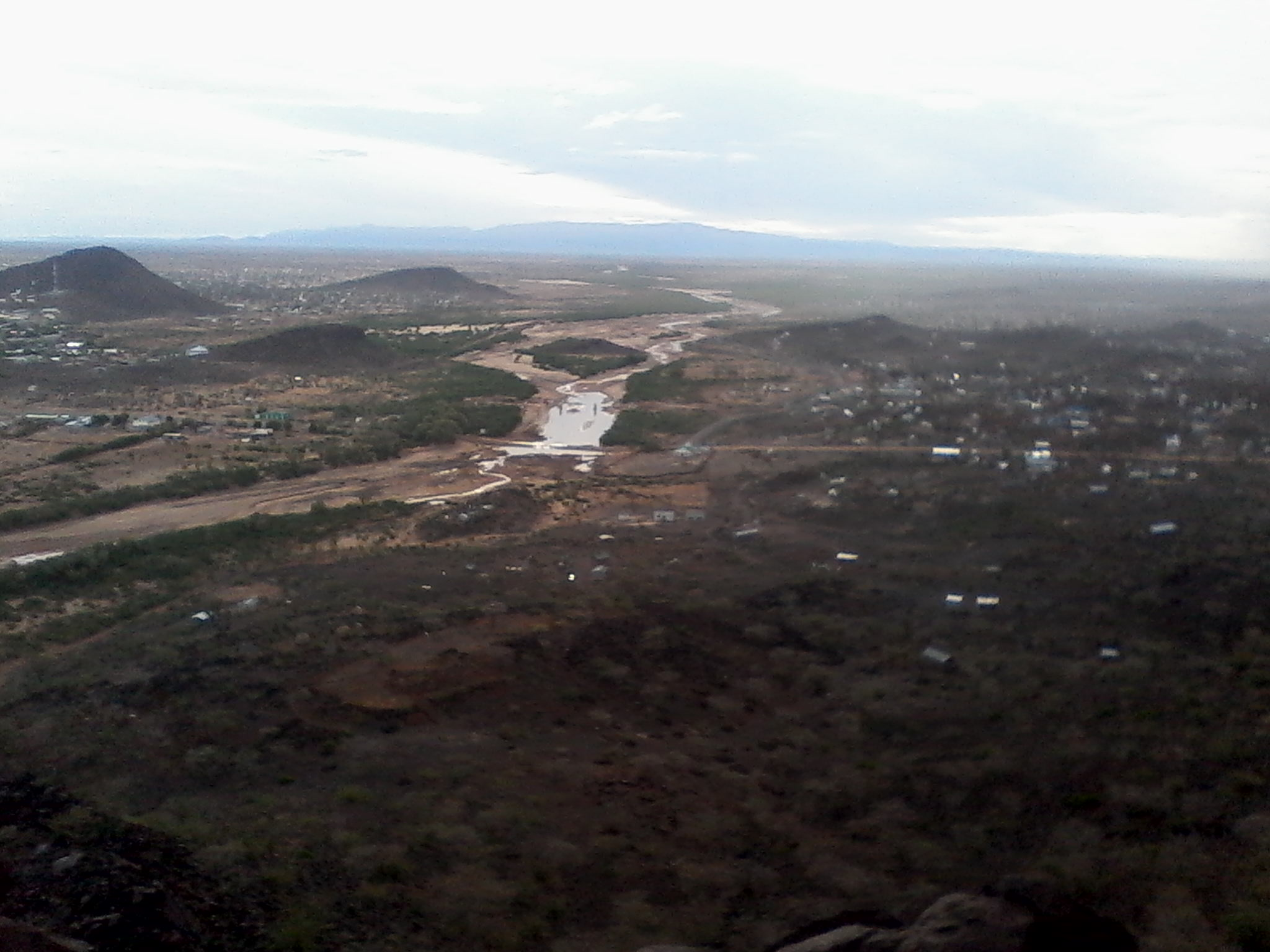 Kiswahili: Mto, Lodwar